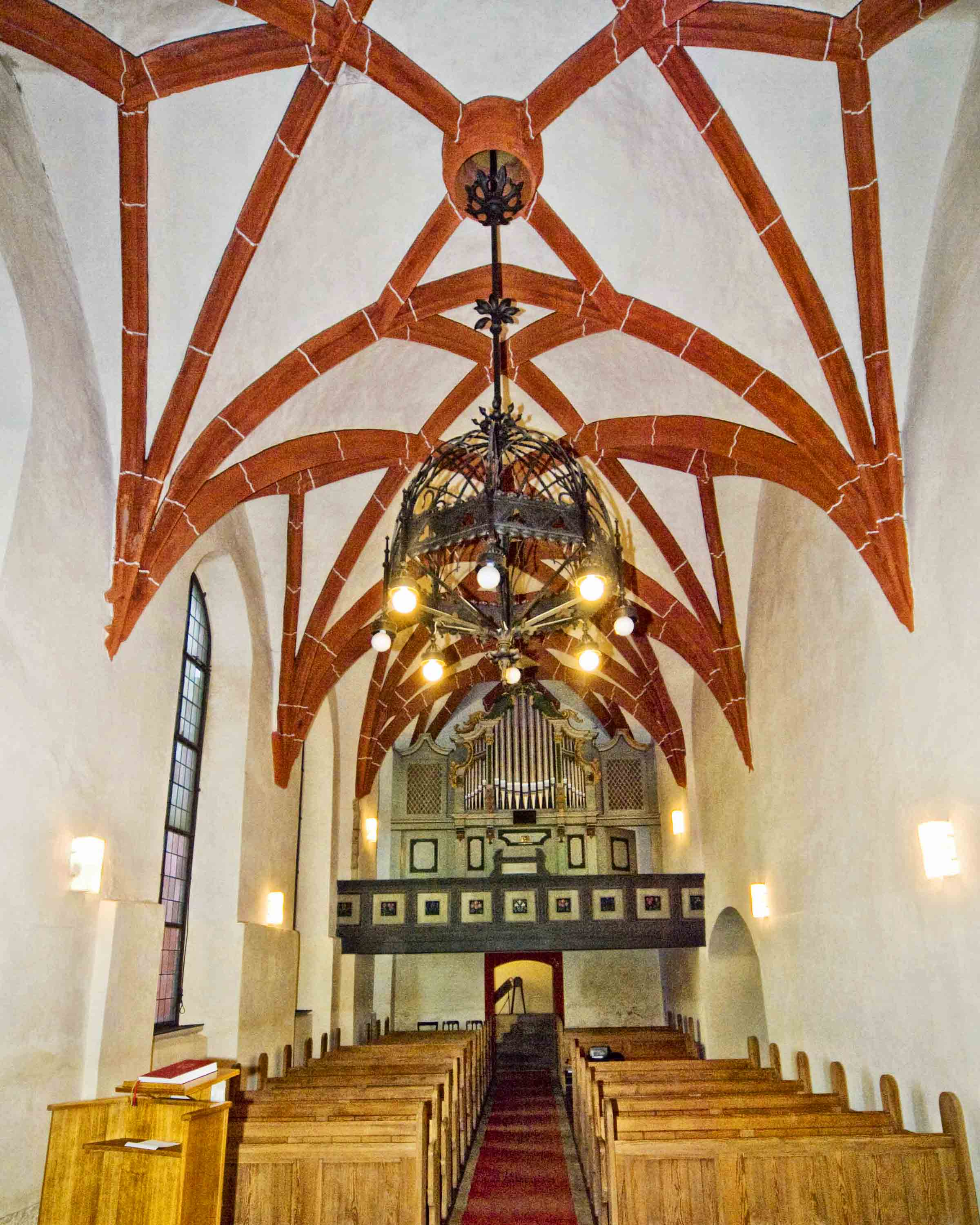 Westansicht mit Orgel in der Kirche Schrebitz